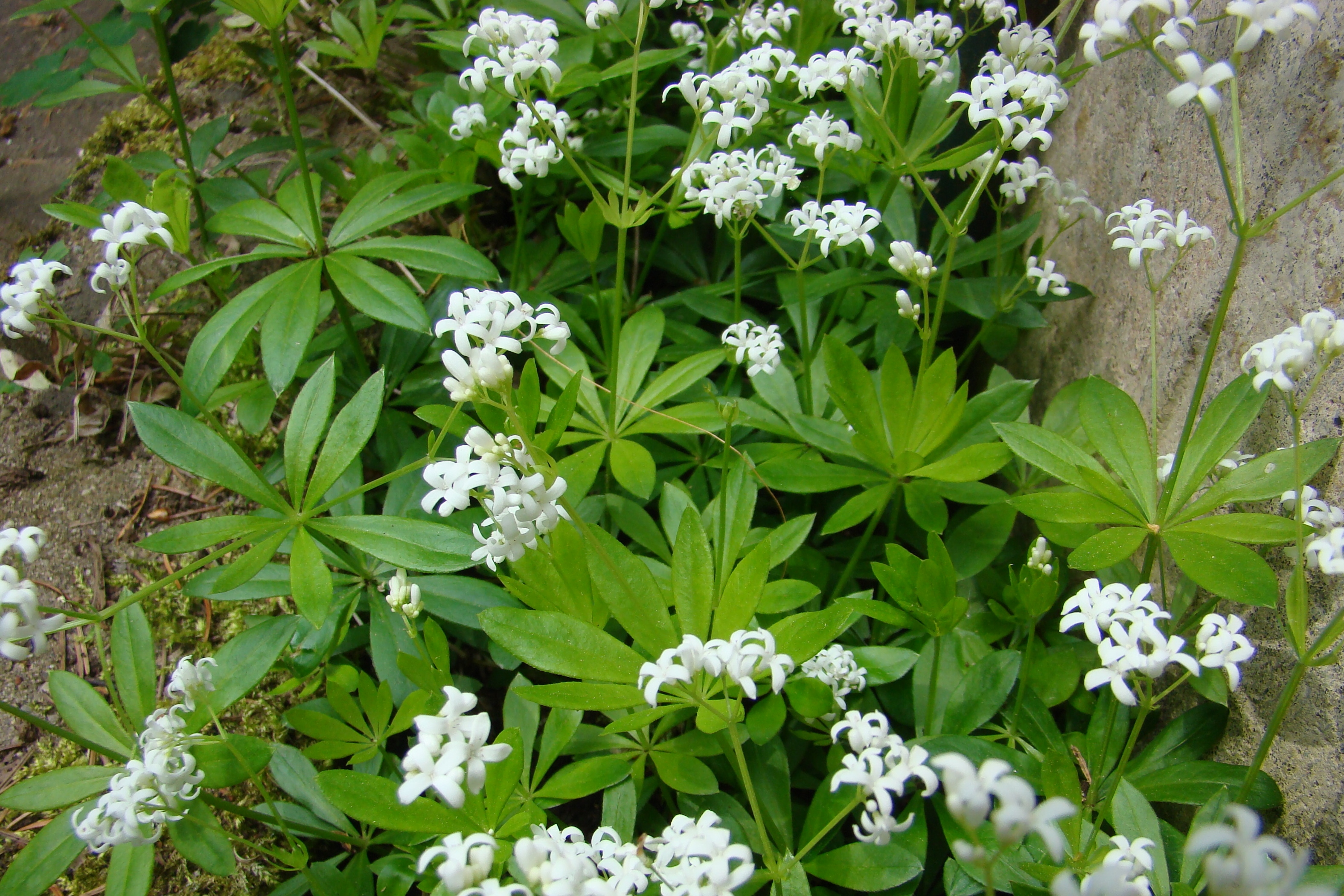 Waldmeister in der Blüte im Mai